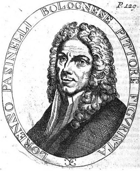 Retrato de Lorenzo Pasinelli, grabado por Luigi Crespi a partir de un autorretrato perdido. Frontispicio de su biografía en Felsina Pittrice, de Carlo Cesare Malvasia, edición de 1769.